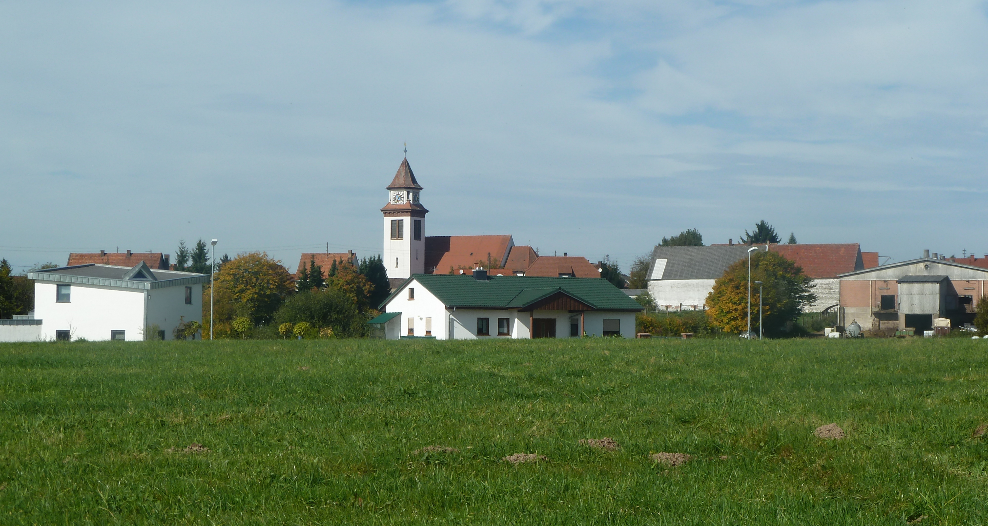 Höheinöd